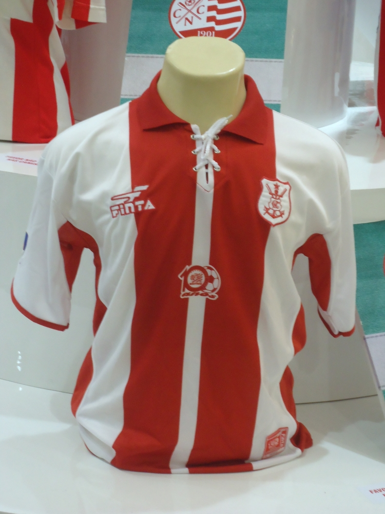 Camisa comemorativa do Náutico usada em 2001, em comemoração ao centenário do clube.